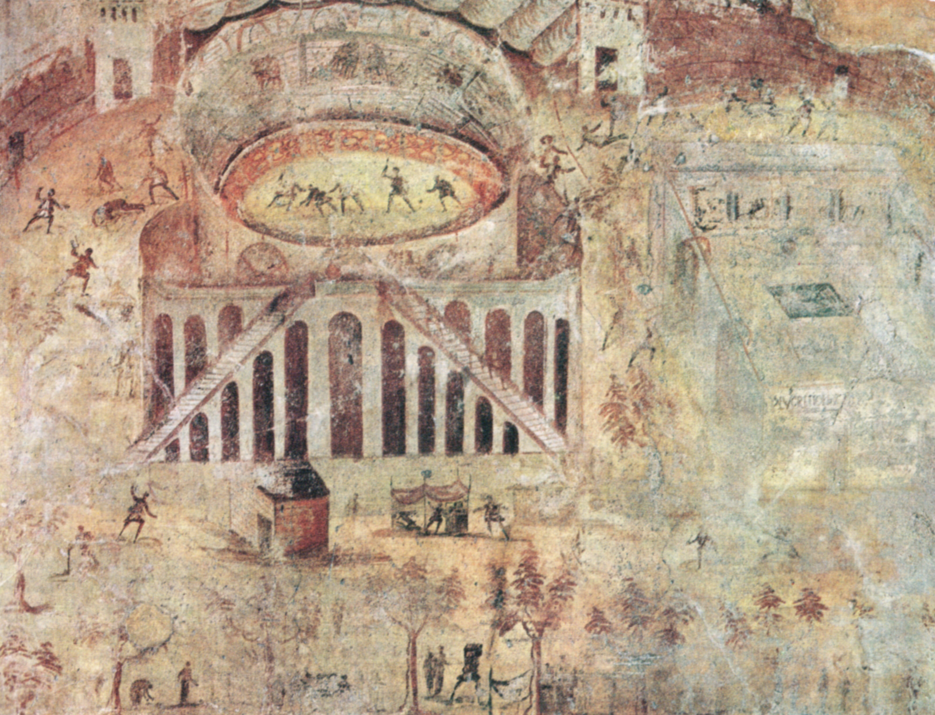 Museo Archeologico Nazionale di Napoli (inv. nr. 112222). Da Pompeii, Casa della Rissa nell'Anfiteatro (I, 3, 23) - L'affresco, famosissimo, è uno dei pochi che mostra un'ambientazione ed un episodio realistici. E' ritratto fedelmente l'anfiteatro di Pompei, con le mura della città alle sue spalle e la grande palestra con piscina centrale alla sua destra. L'episodio ritratto è quello della rissa scoppiata fra Pompeiani e Nucerini nell'anno 59 d.C. in cui ci furono numerosi morti, tanto da indurre il Senato Romano a proibire nell'anfiteatro di Pompei l'esecuzione dei giochi gladiatorii per ben dieci anni. L'episodio viene narrato dallo storico Tacito (Annali, XIV, 17).